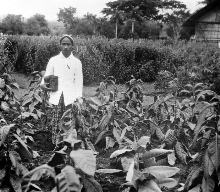 Repronegatief. Landbouw tentoonstelling; op de voorgrond bevolkingstabak, daarachter Crotalaria usaramoensis, links olifantsgras met Crot. als tussengewas, Wates